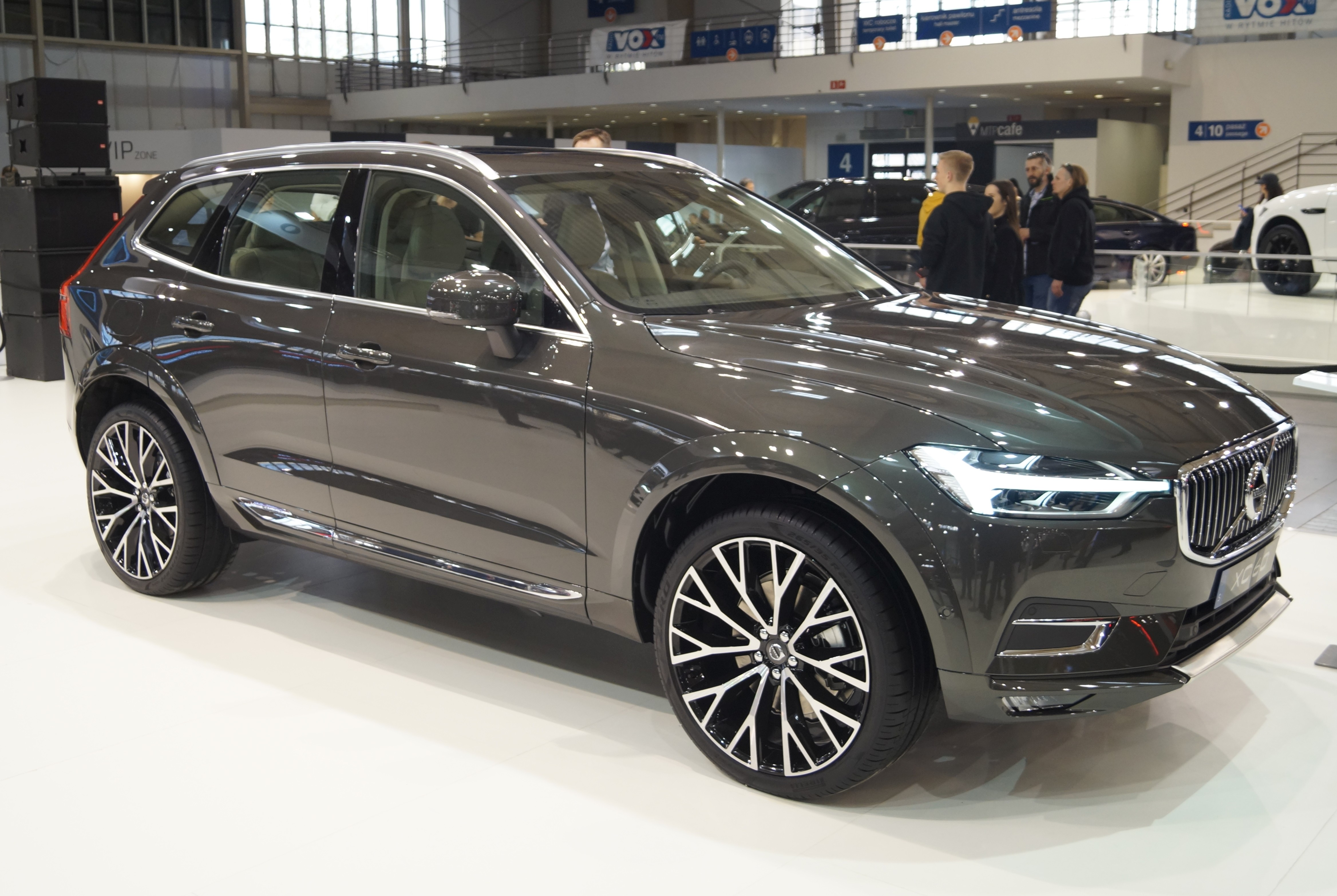 Prawy przód Volvo XC60 na Motor Show Poznań 2017.